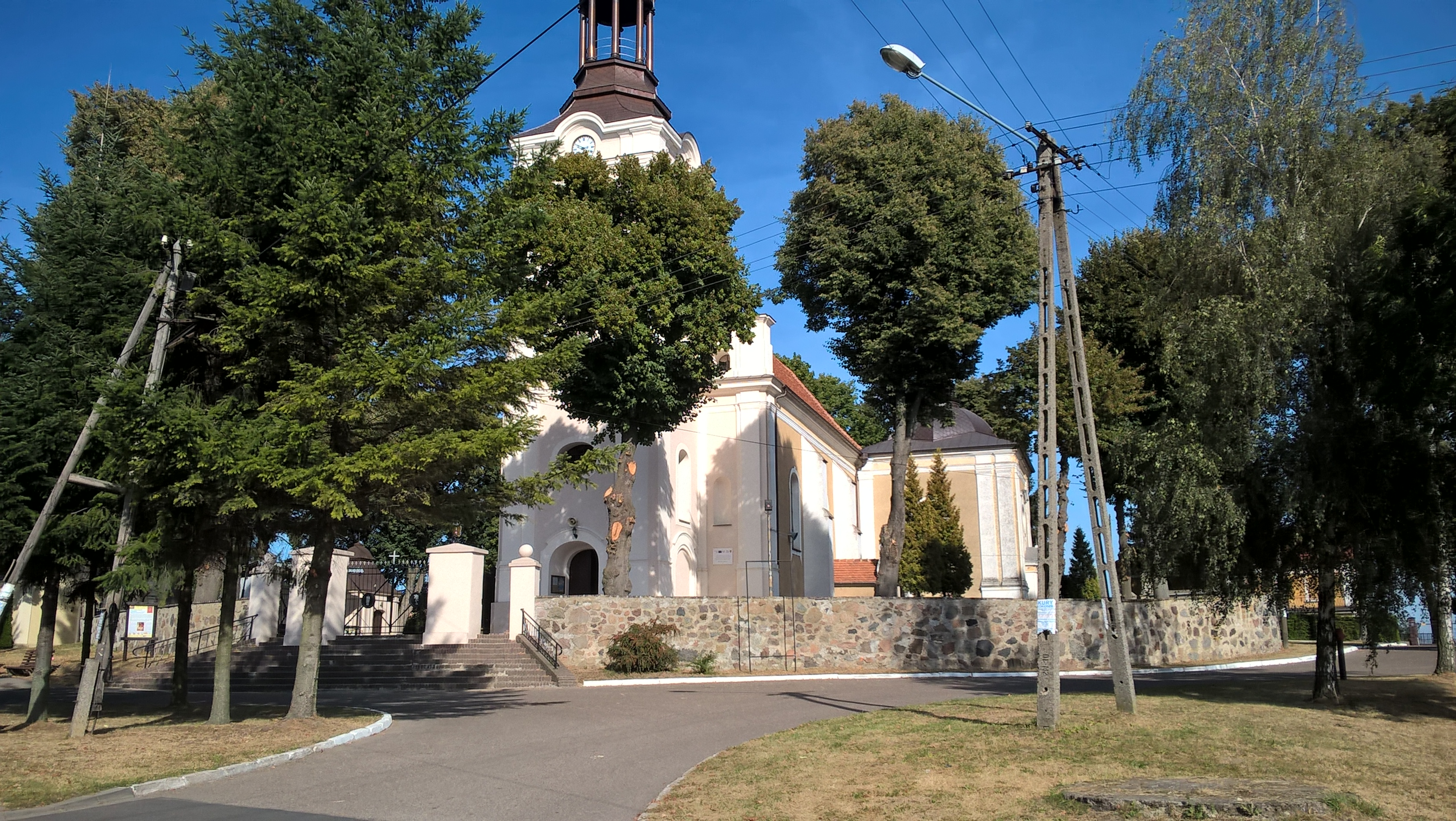 Kościół w Biezdrowie - widok od strony wieży